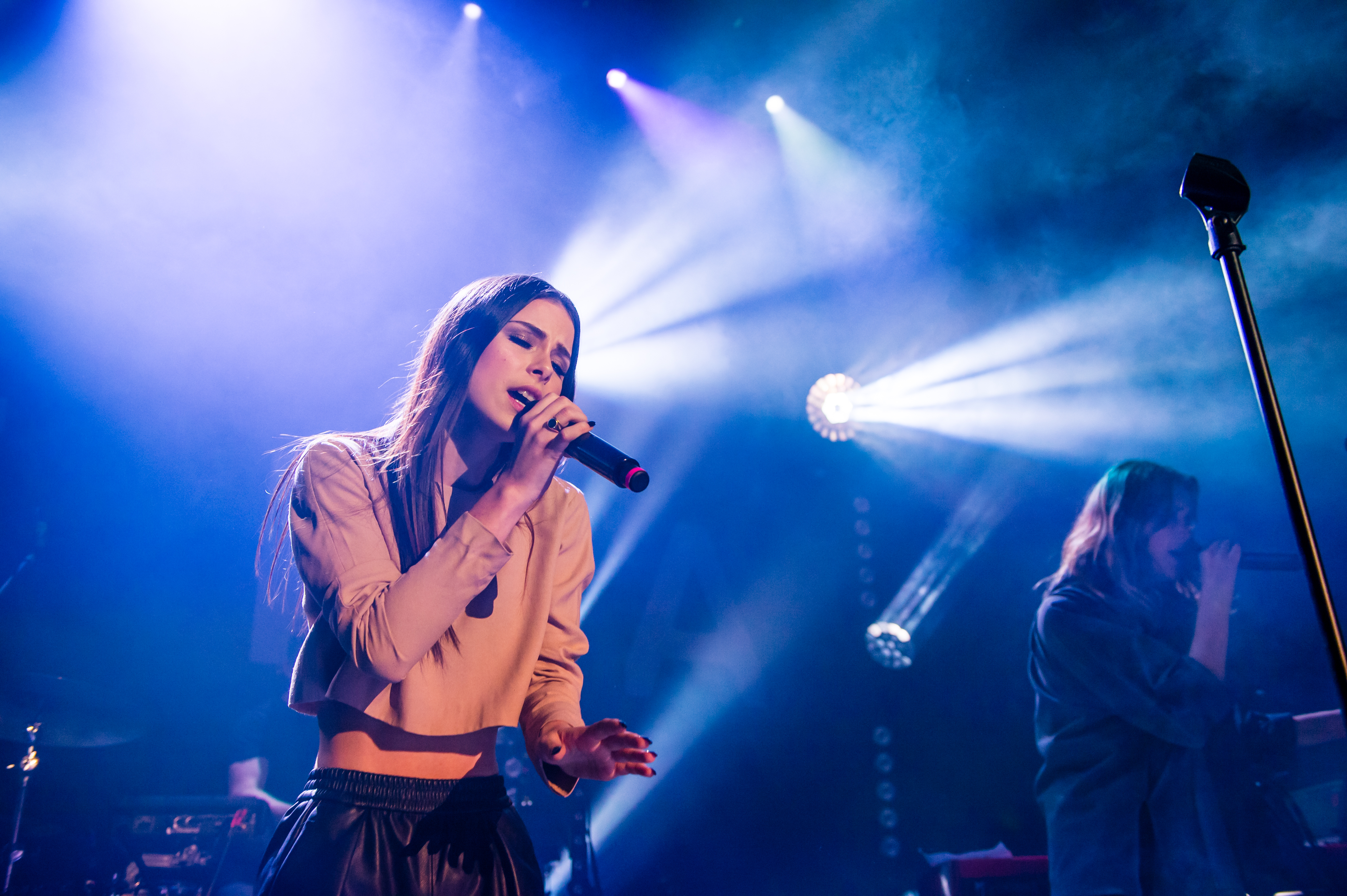 'Lena Meyer-Landrut Carry you Home Tour 2015 Köln'